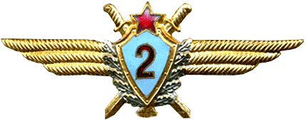 Нагрудный знак классной квалификации "Военный летчик 2-го класса"